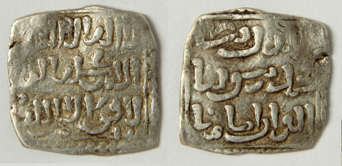 Dirhams frappés sous le règne du sultan mérinide Abu al-Hasan ben Uthman.